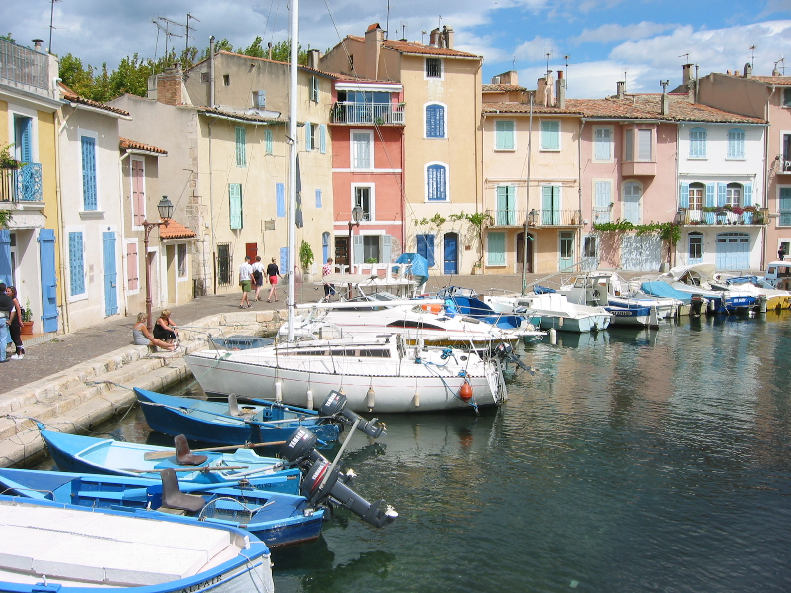 Martigues, Bouches-du-Rhône, France Quartier de l'île sur le canal, lieu dit : Le miroir aux oiseaux